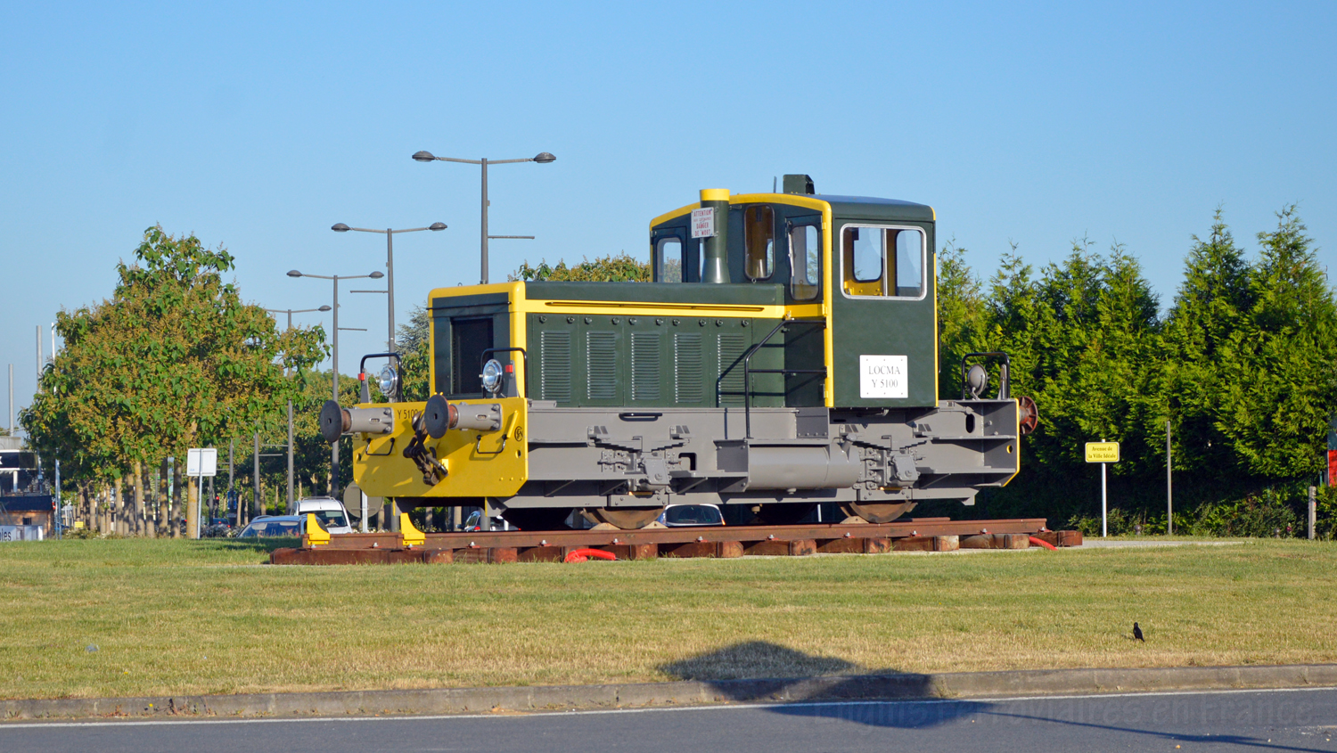 Locma Y 5100 à Longueau